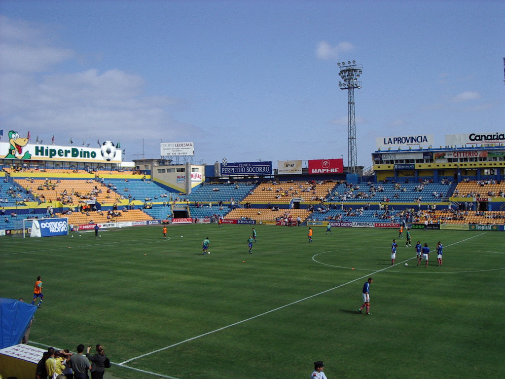 Estadio Insular de Las Palmas de Gran Canaria, 7 de junio de 2003